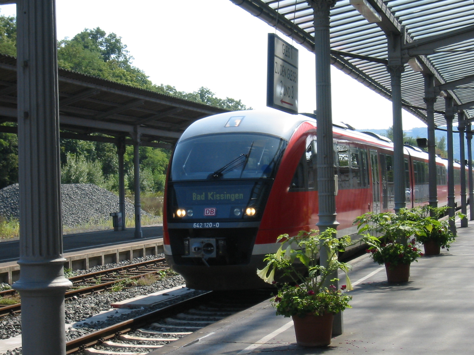 Der Dieseltriebwagen 120-0 der Baureihe 642 am 3.9.2004 in Bad Kissingen. (Bild von Christian Jackwert selbst fotografiert, zur freien Verwendung) Afbeelding:VT 642 Kissingen.JPG